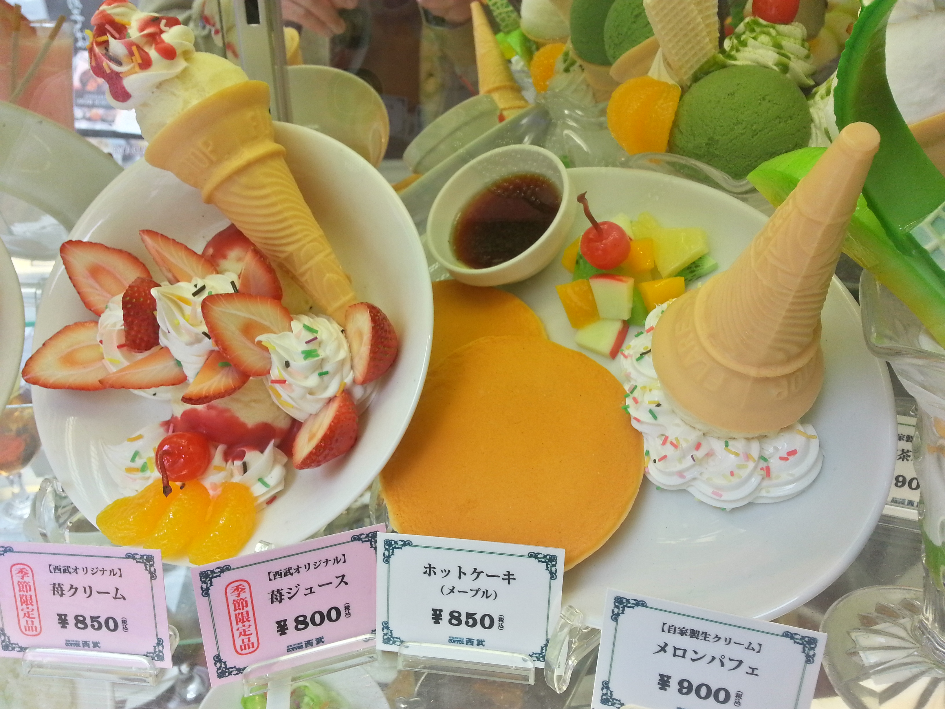 Shinjuku, Tokyo Japan 季節限定品